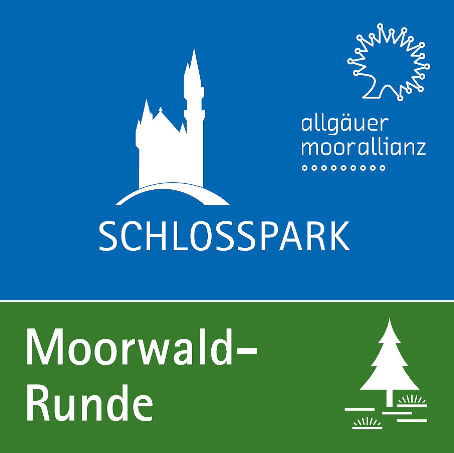 Logo Moorwald-Runde